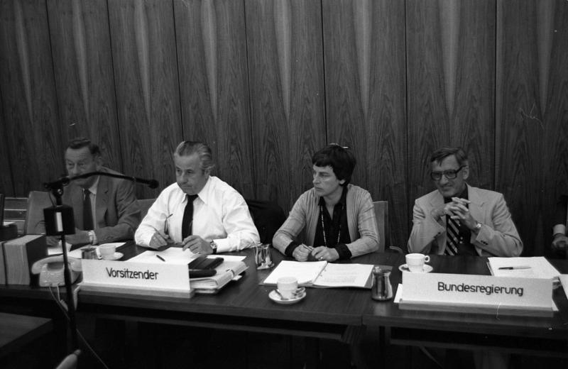 Sitzung des Ausschusses für Arbeit und Sozialordnung des Deutschen Bundestages. Anhörung von Sachverständigen zum Rentenanpassungsgesetz.